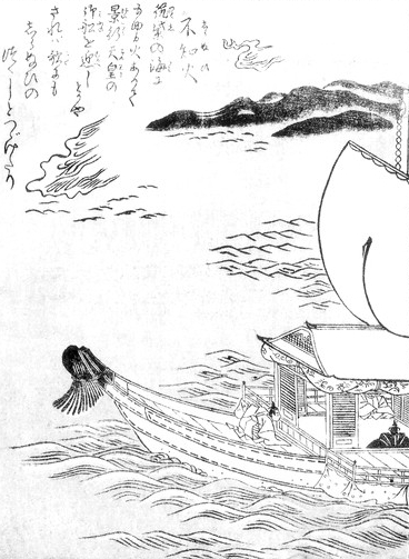 Shiranui (不知火) from the Konjaku Gazu Zoku Hyakki (今昔画図続百鬼)